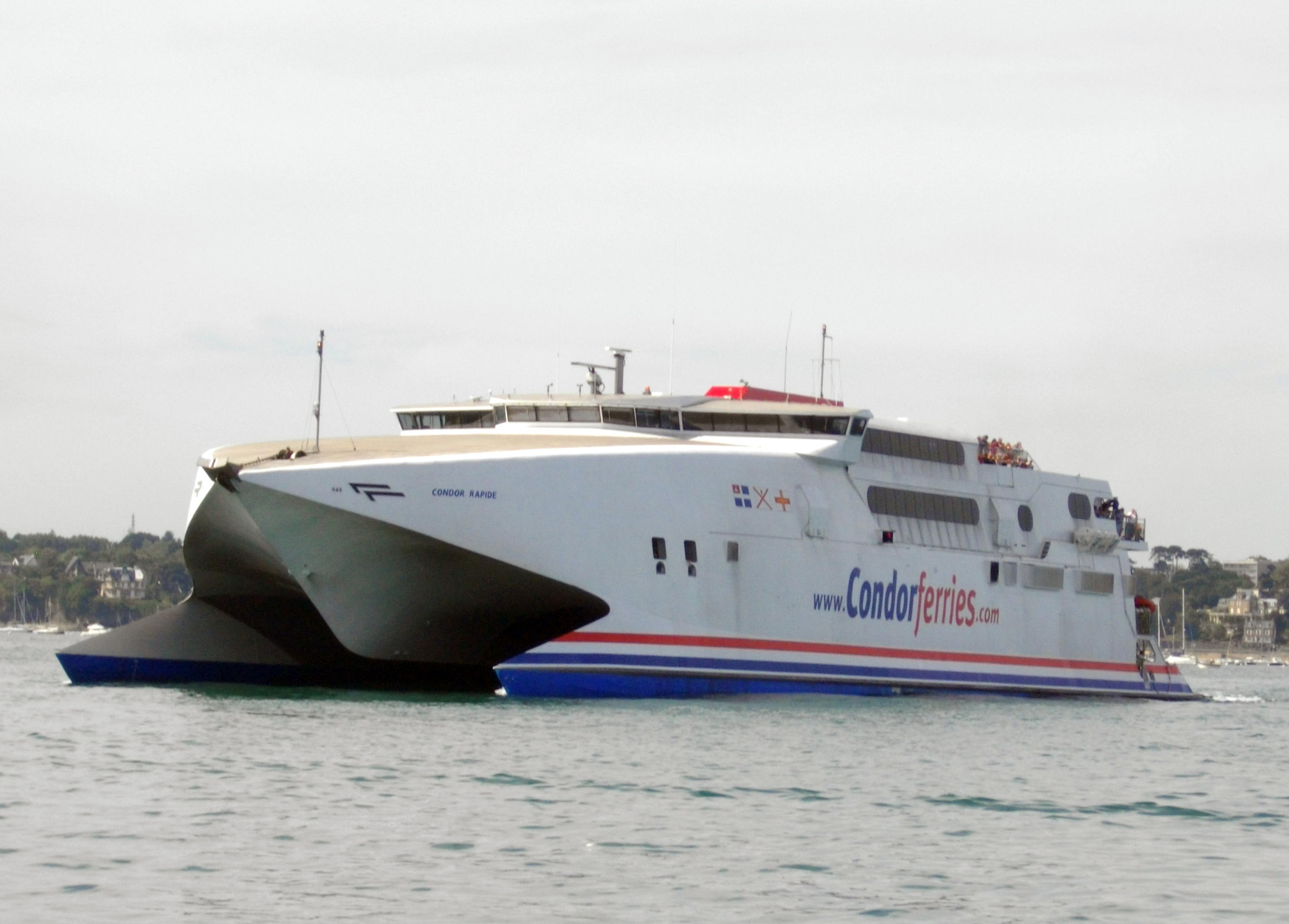 Le Condor Rapide, catamaran-ferry de la compagnie Condor Ferries, dans le port de Saint-Malo.